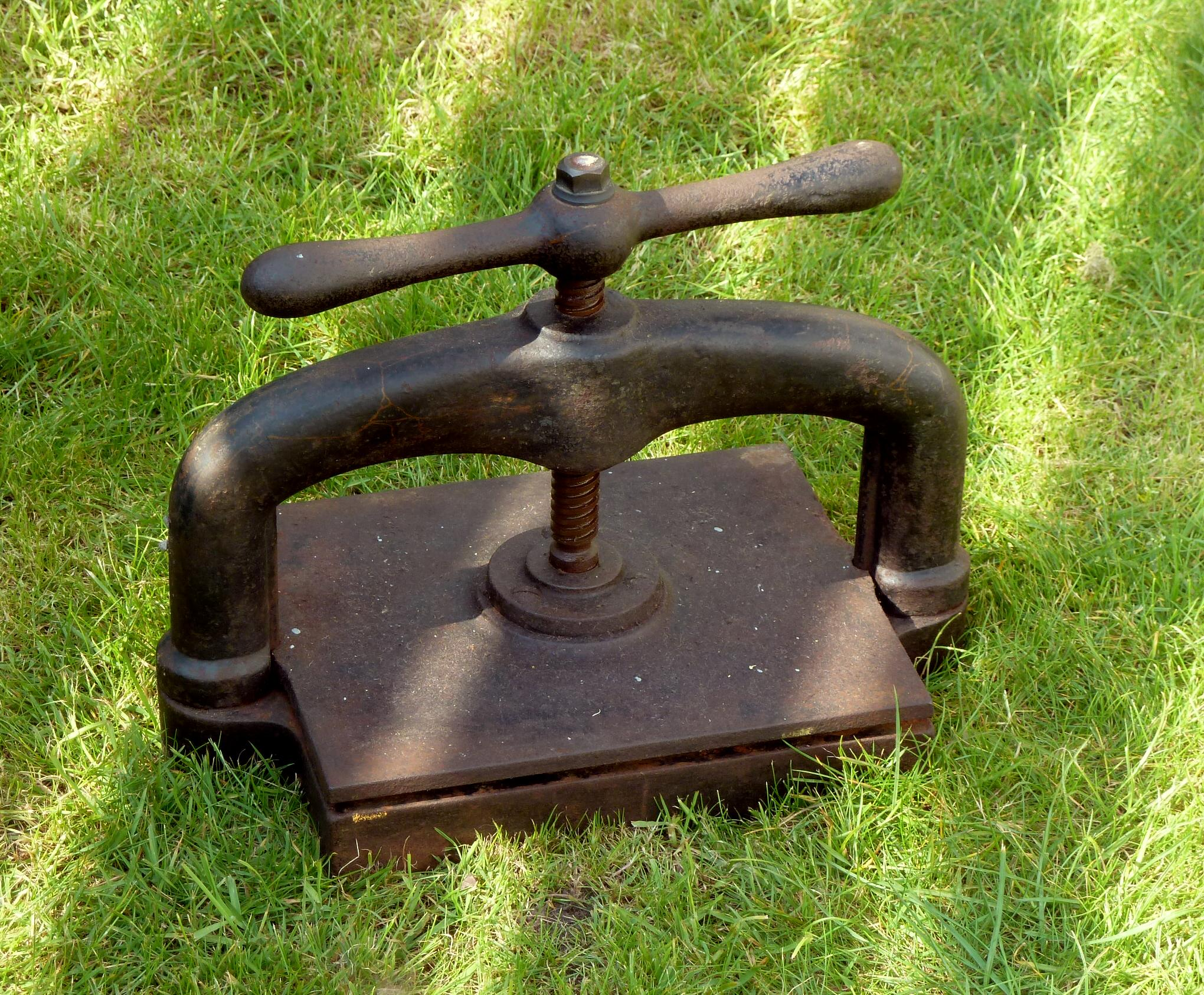 Bookbinding press